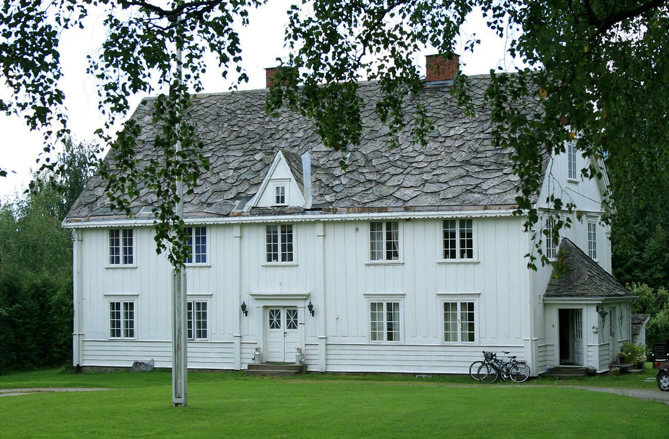 Våningshus, Skjellerud, Lillehammer. Freda 1923.